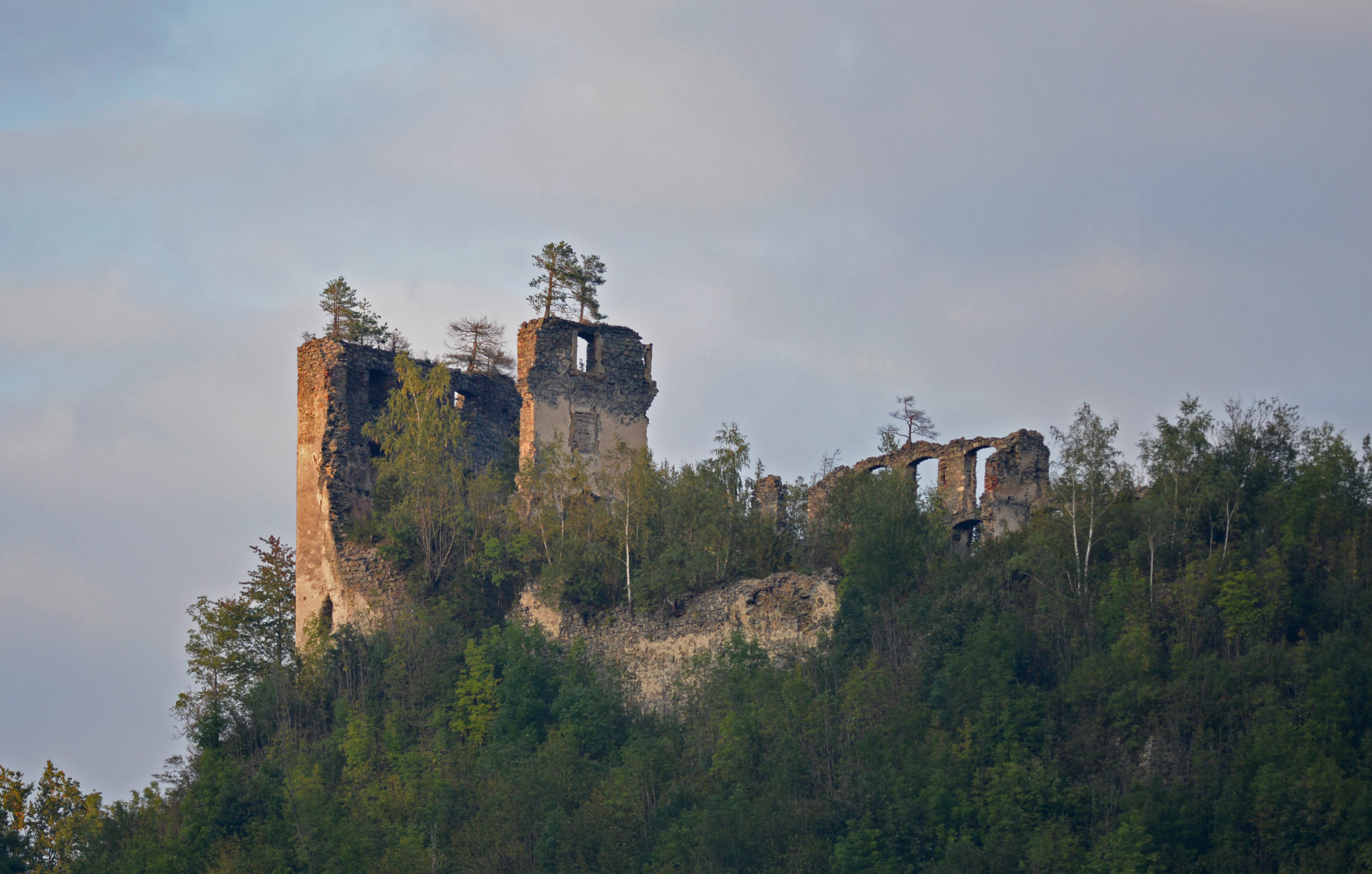 Burgruine Kaisersberg